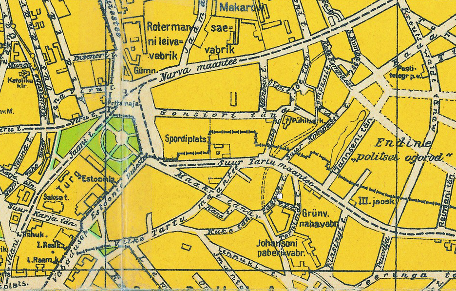 Tallinna plaan